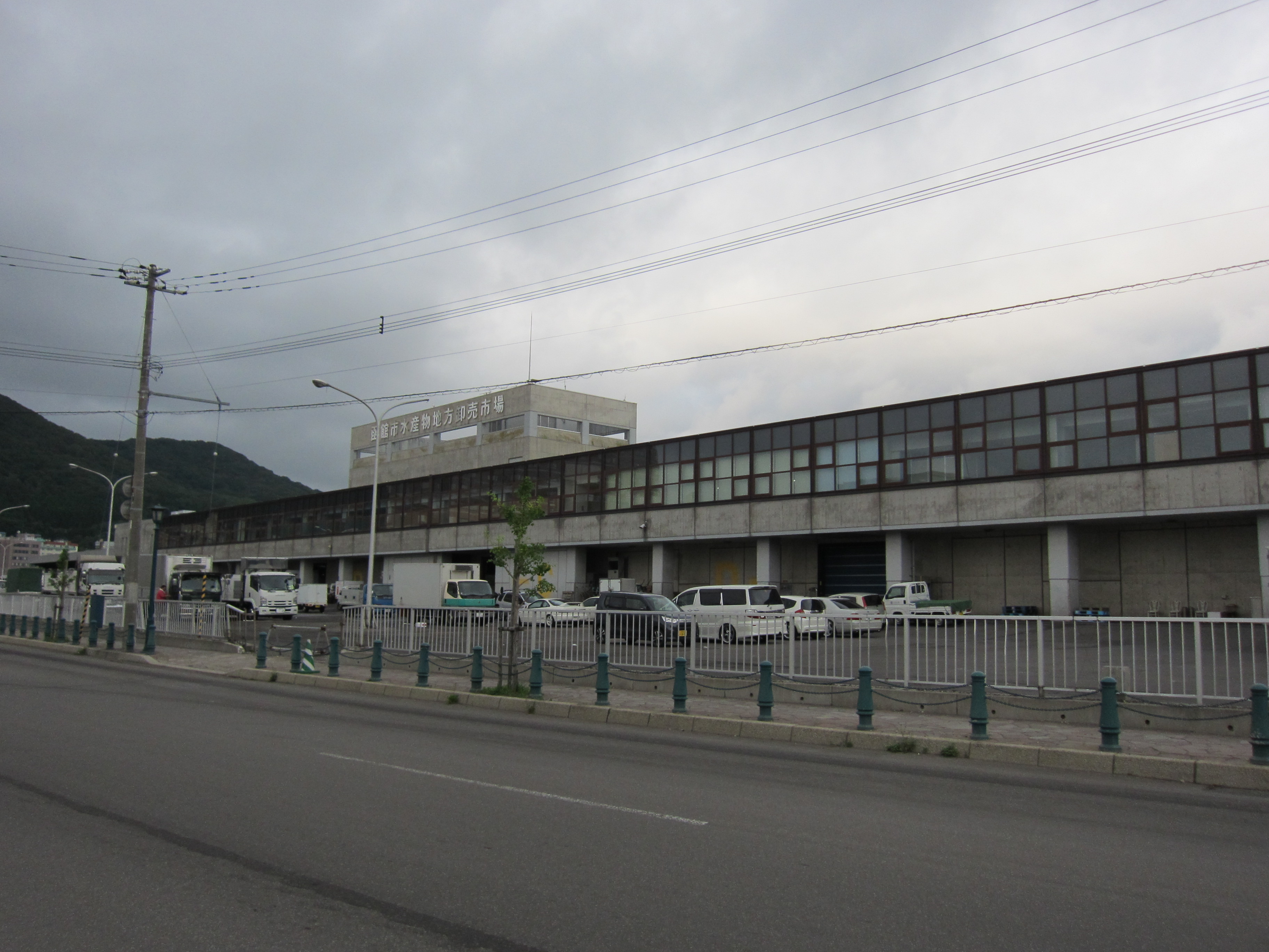 函館市水産物地方卸売市場